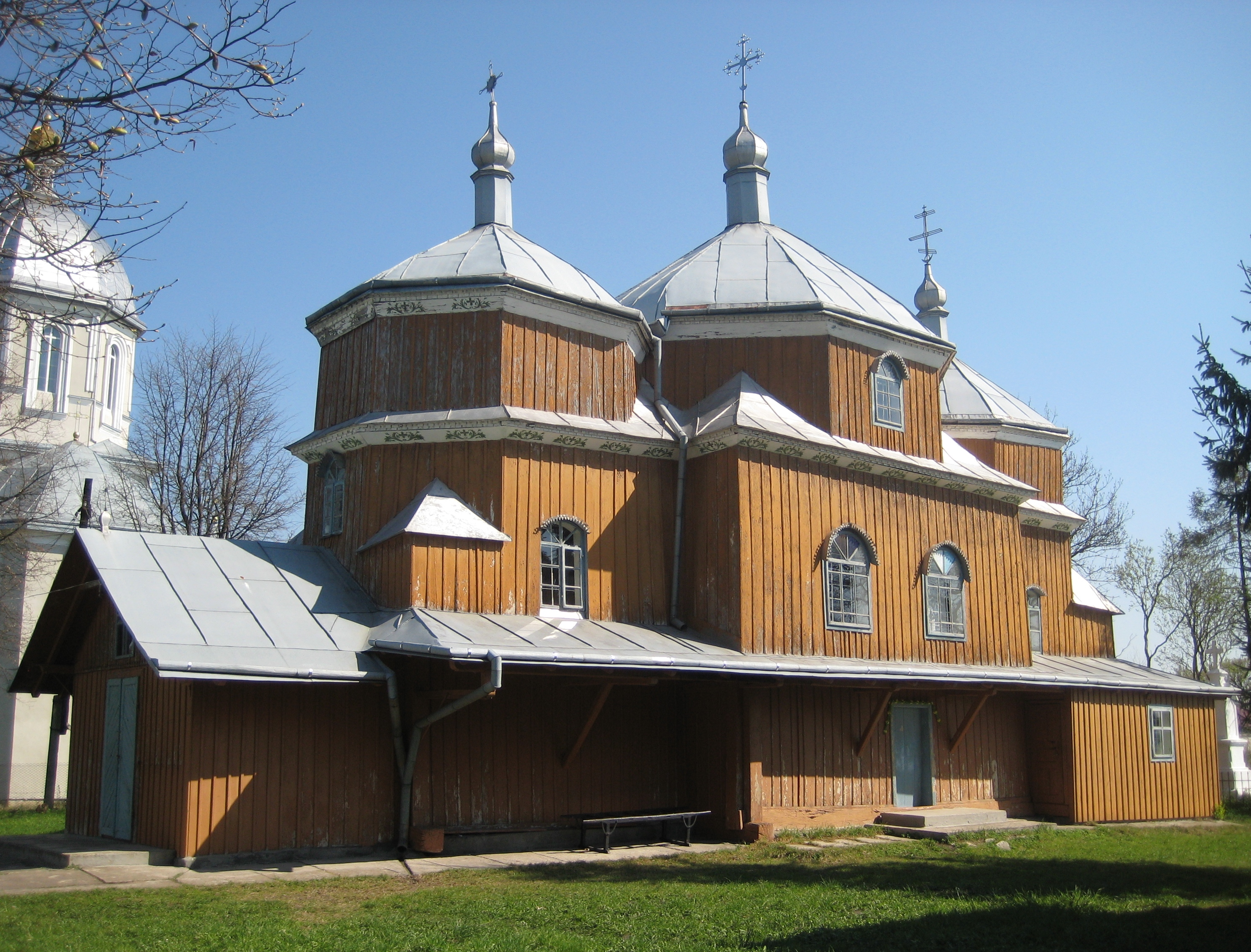 Дерев'яна церква Преображення Господнього, с.Грімне, 1777p.